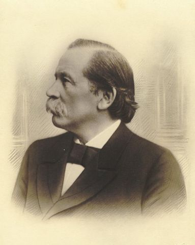 Peter Paul Cahensly (1838-1923), Unternehmer und Reichstagsabgeordneter, Zentrum